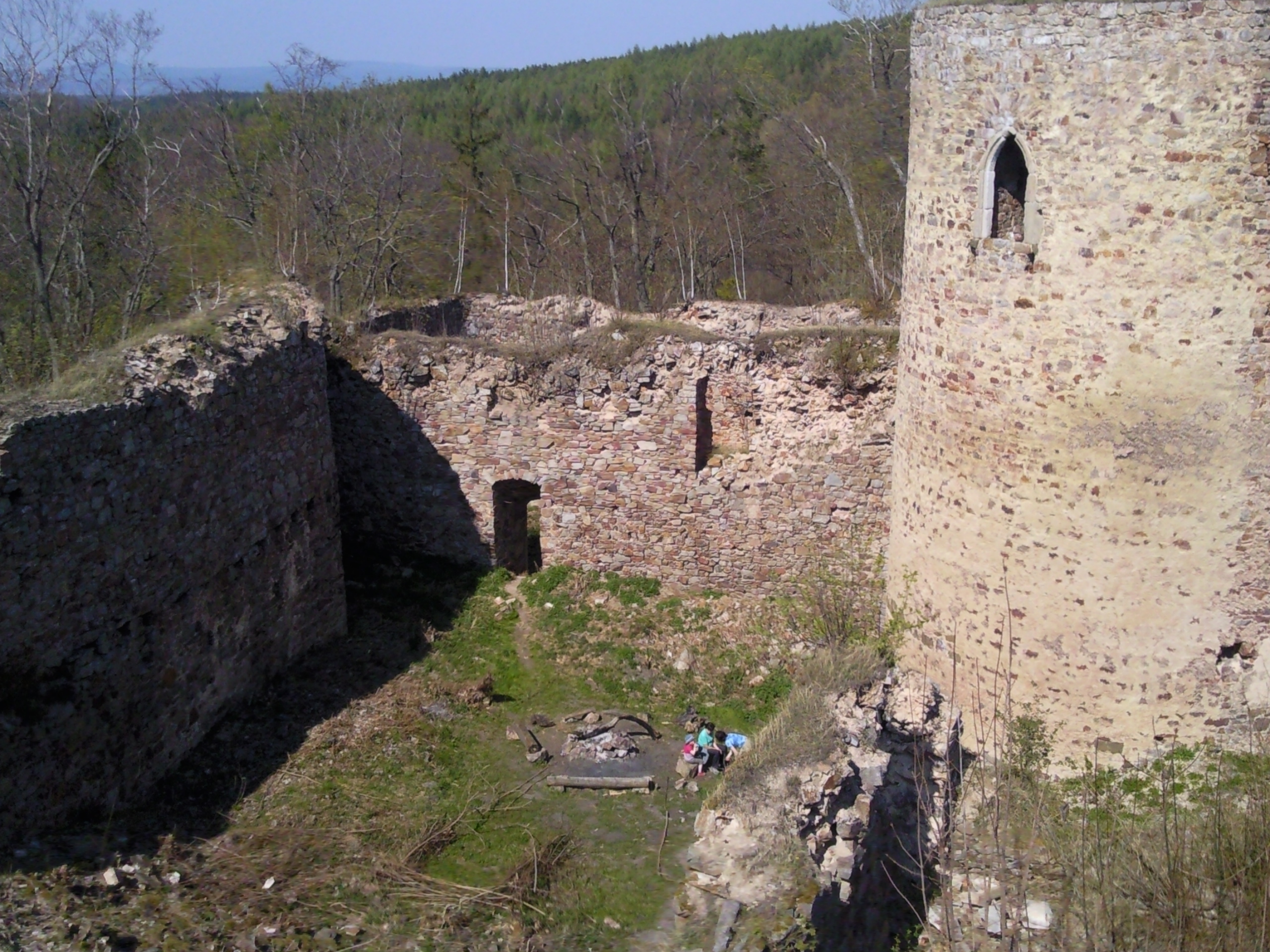 Hrad Valdek, zřícenina a archeologické stopy (Hrachoviště)